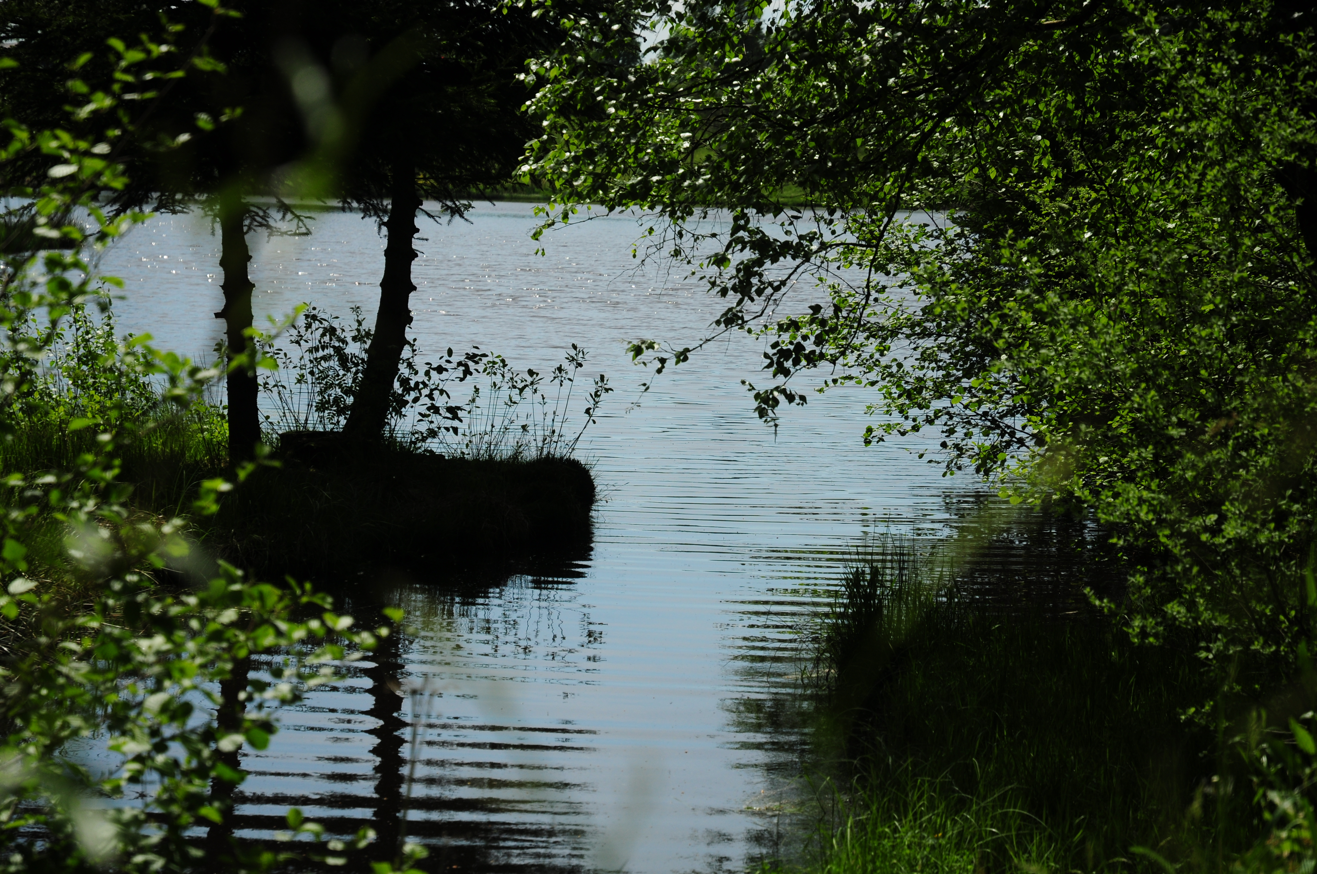 Fichtelgebirge, Oberfranken